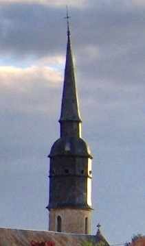 Flèche_du_clocher